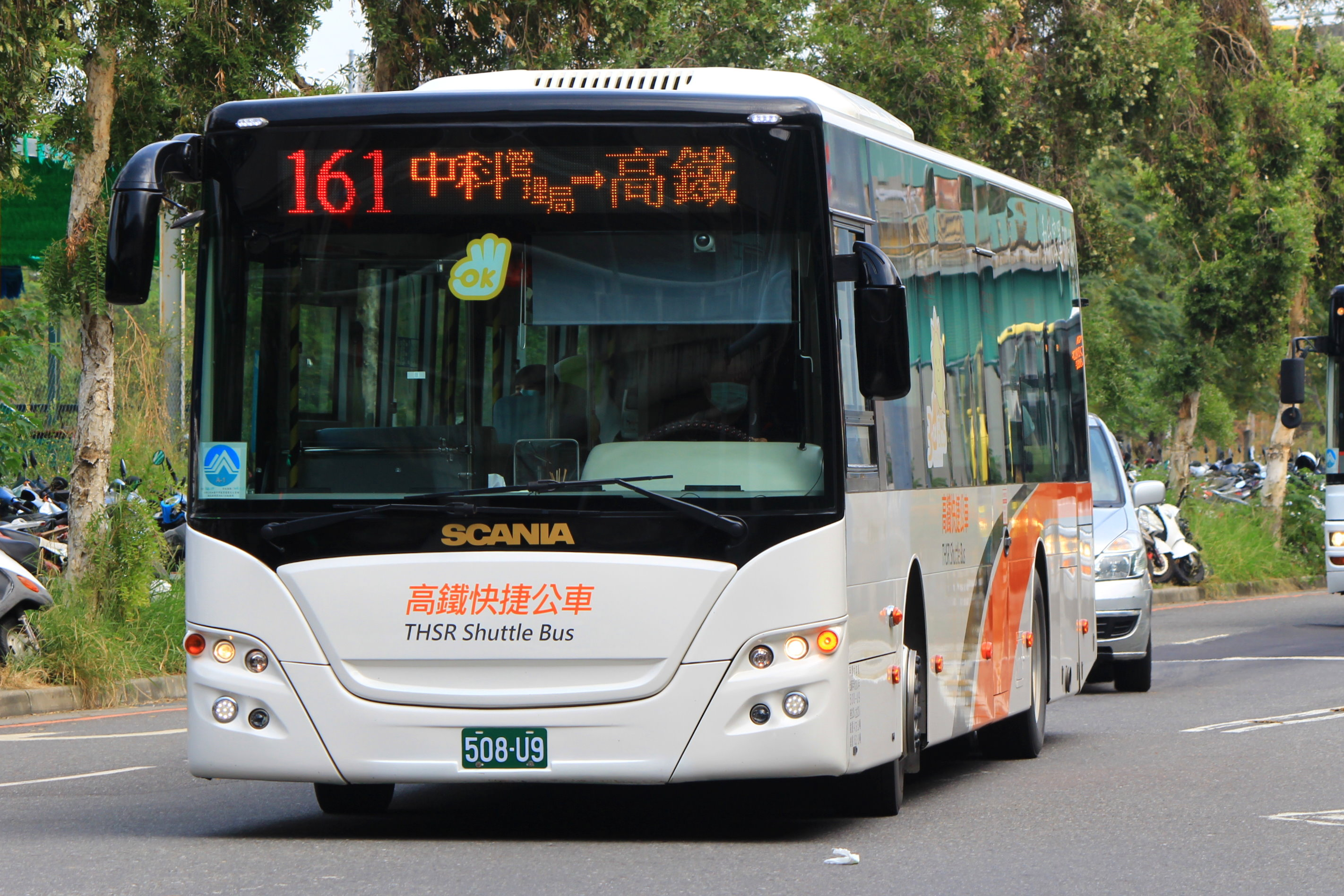 中文（台灣）: 161 高鐵台中站